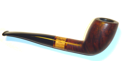 Pipa Stanwell model Zembrano propietat de Carles Royo Porta